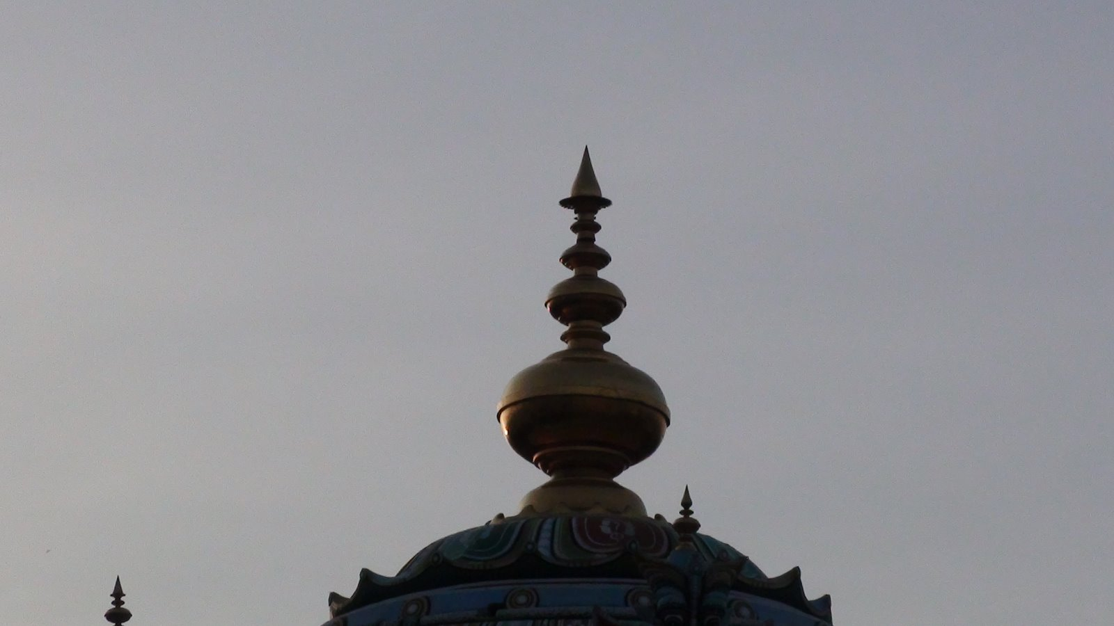 கோயில் அழகுக்கு அழகு சேர்ப்பது கோயிலின் கோபுரம். கோபுரத்தின் அழகுக்கு அழகு சேர்ப்பது கலசமாகும். கலசத்தின் அழகிய தோற்றம்.